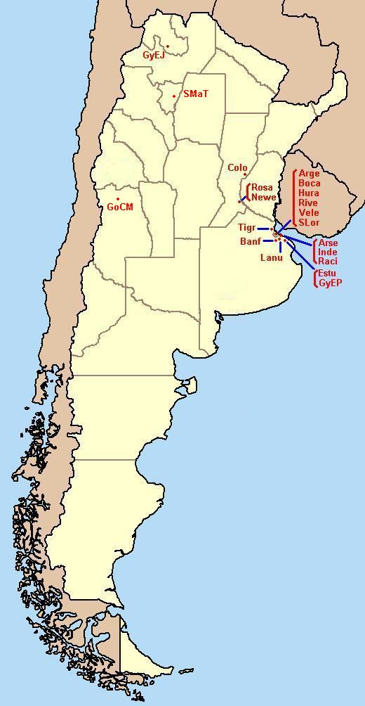 Mapa de la primera division argentina de futbol durante la edicion 2008-2009 marcado las ciudades o municipios exactos donde se enncuentran los estadios de futbol de los 20 equipos participantes